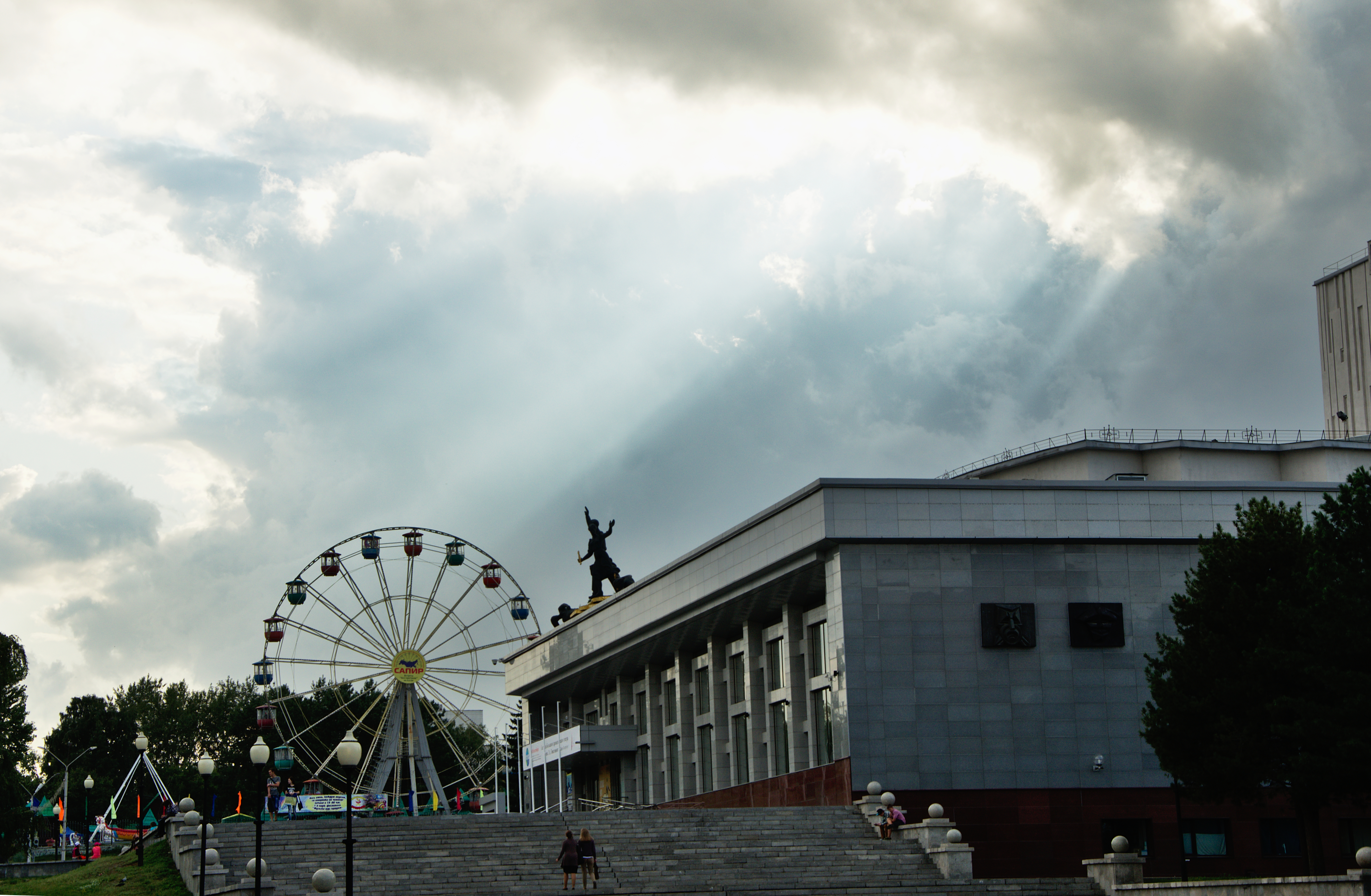 Алтайский театр драмы